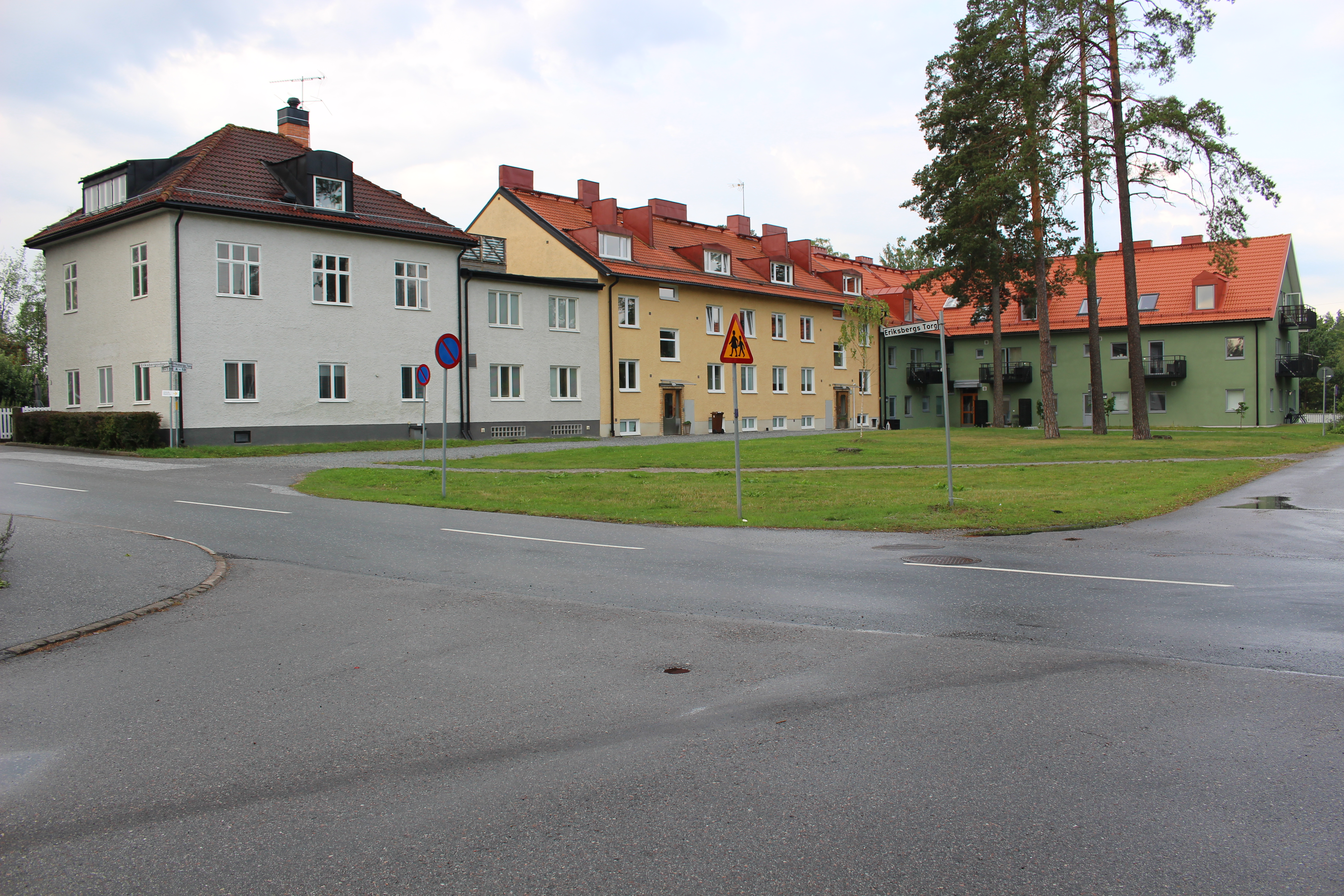 Eriksbergs torg. Vy mot sydväst.